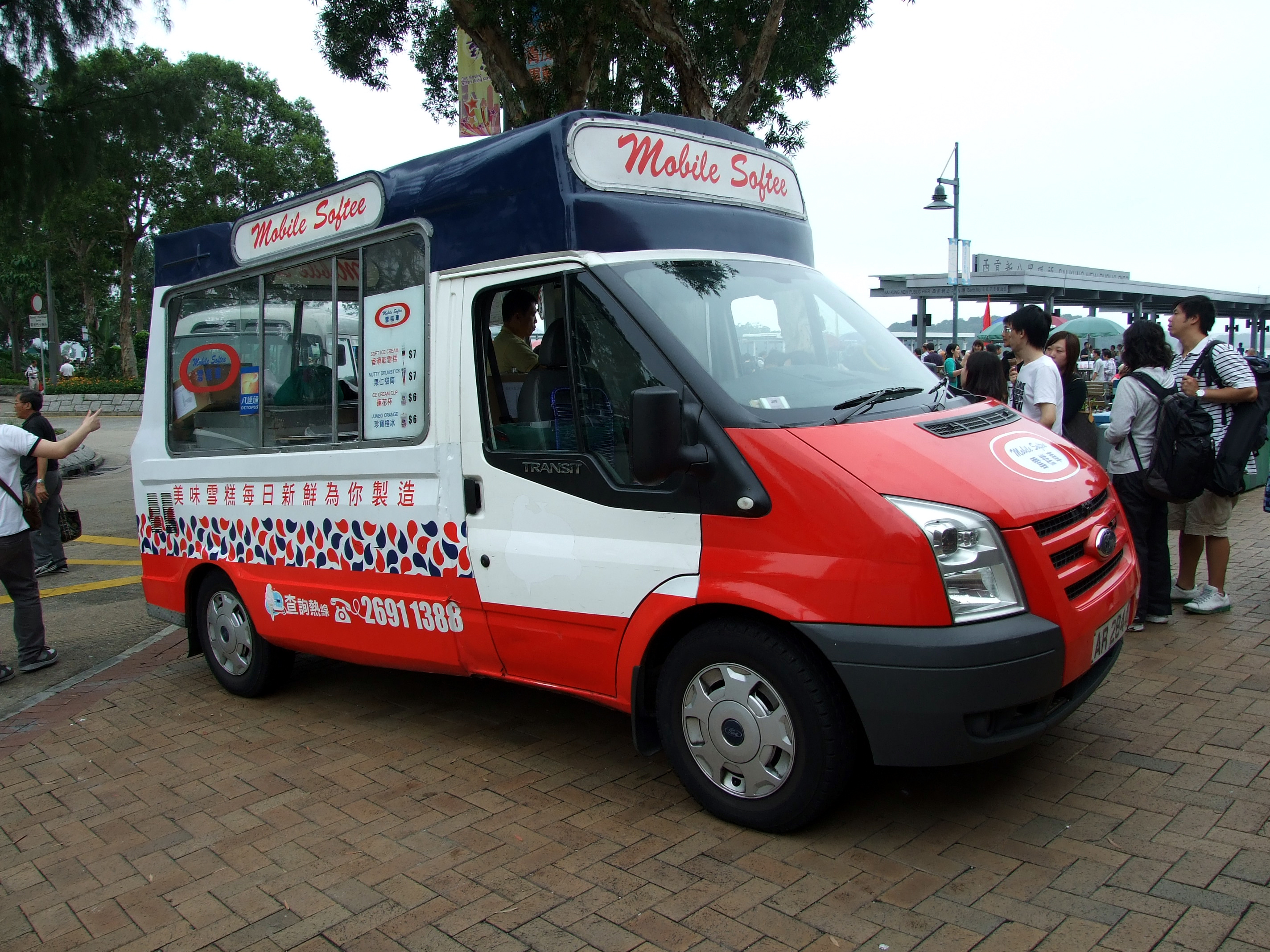 停泊西貢碼頭外的雪糕車